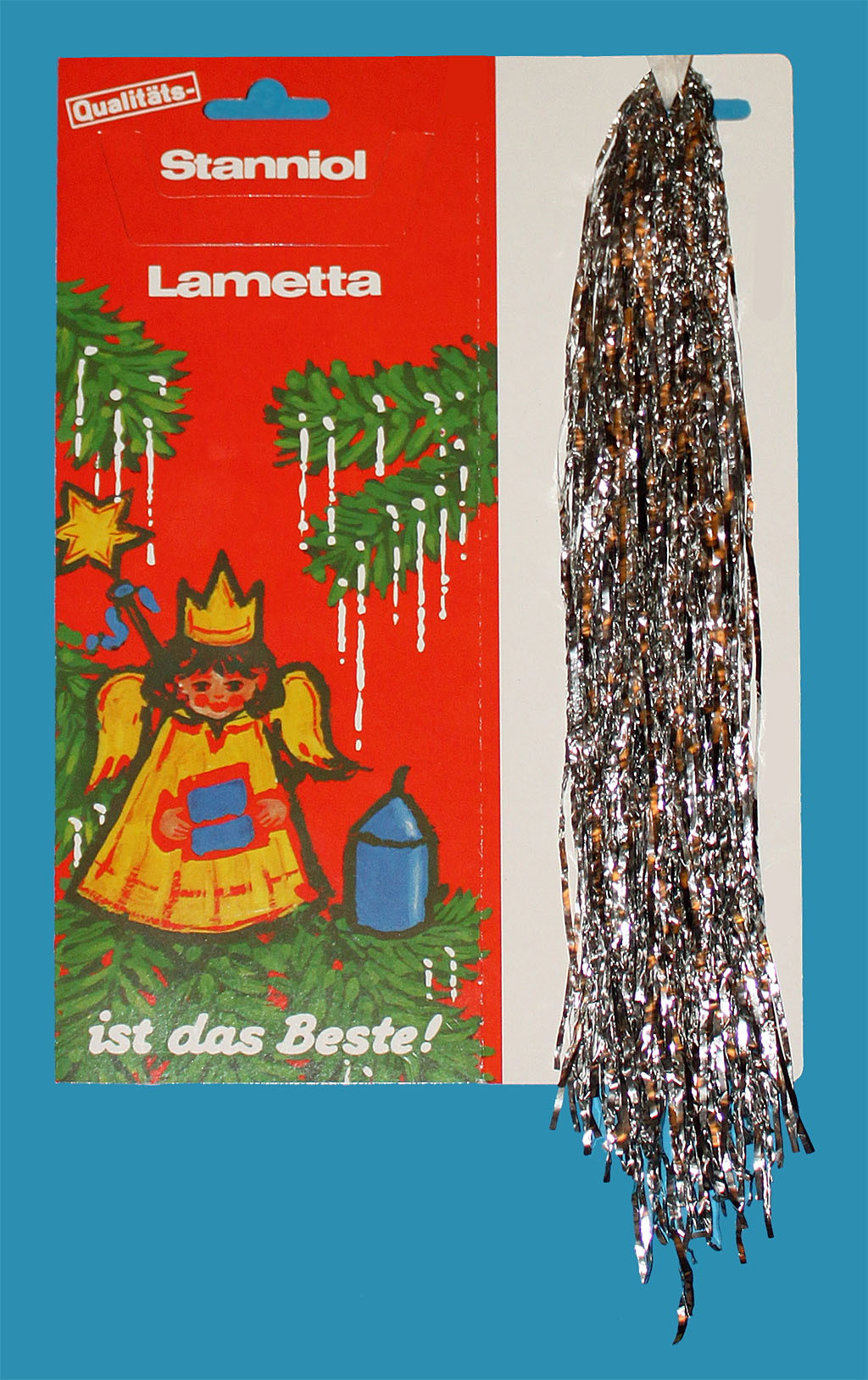 Lametta